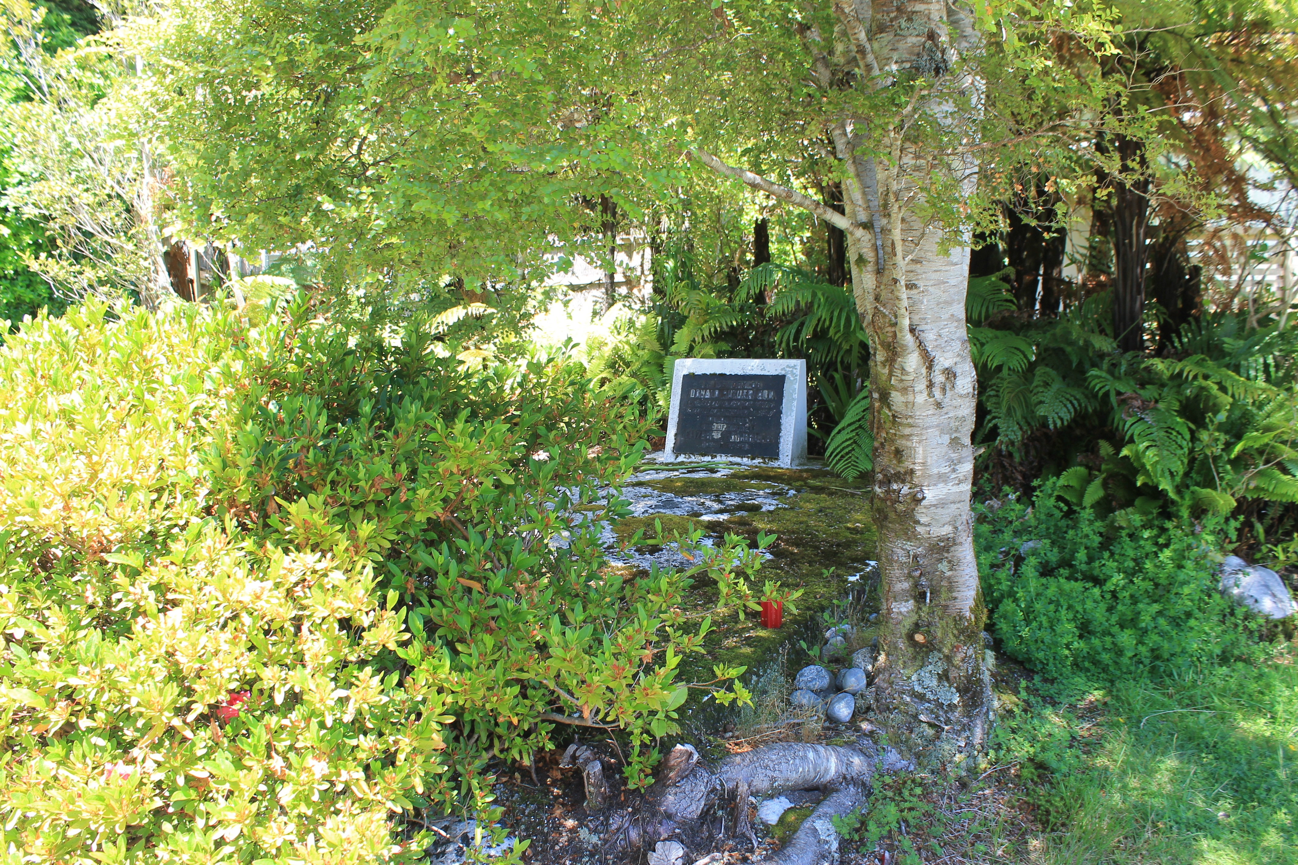 Grab des Sutherlands, Milford Sound